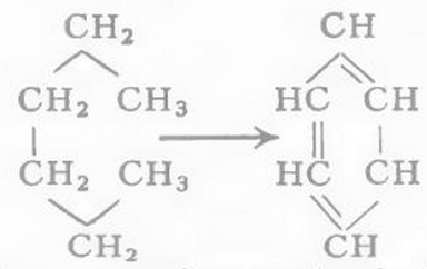 Բենզոլ